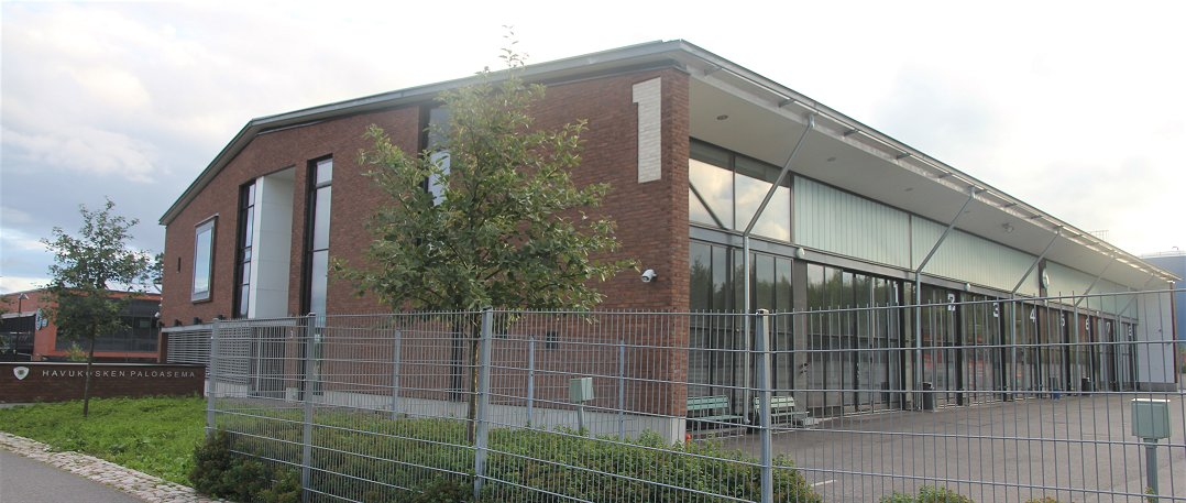 Havukosken paloasema on Keski-Uudenmaan pelastuslaitoksen paloasema Vantaan Koivukylän suuralueen Havukosken kaupunginosassa. Se aloitti toimintansa helmikuussa 2011, jolloin Hiekkaharjun paloaseman kalusto ja miehistö muutti sinne. Paloasema on hälytysajojen määrällä mitattuna Suomen toiseksi suurin paloasema Helsingin Kallion keskuspaloaseman jälkeen.